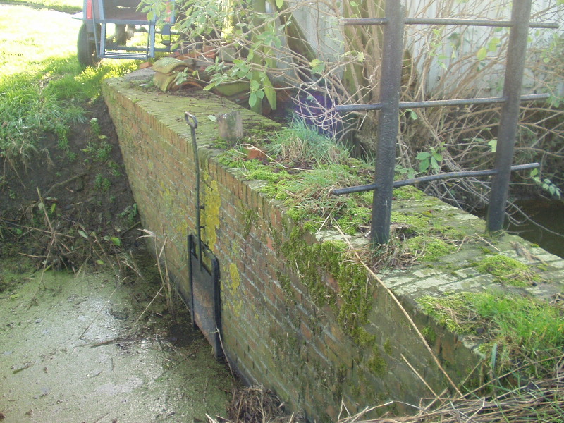 Description Inlaat KoningslaagteSource nvtAuthor gebruiker:SerassotPermission(Reusing this file) eigen werk Inlaat Koningslaagte